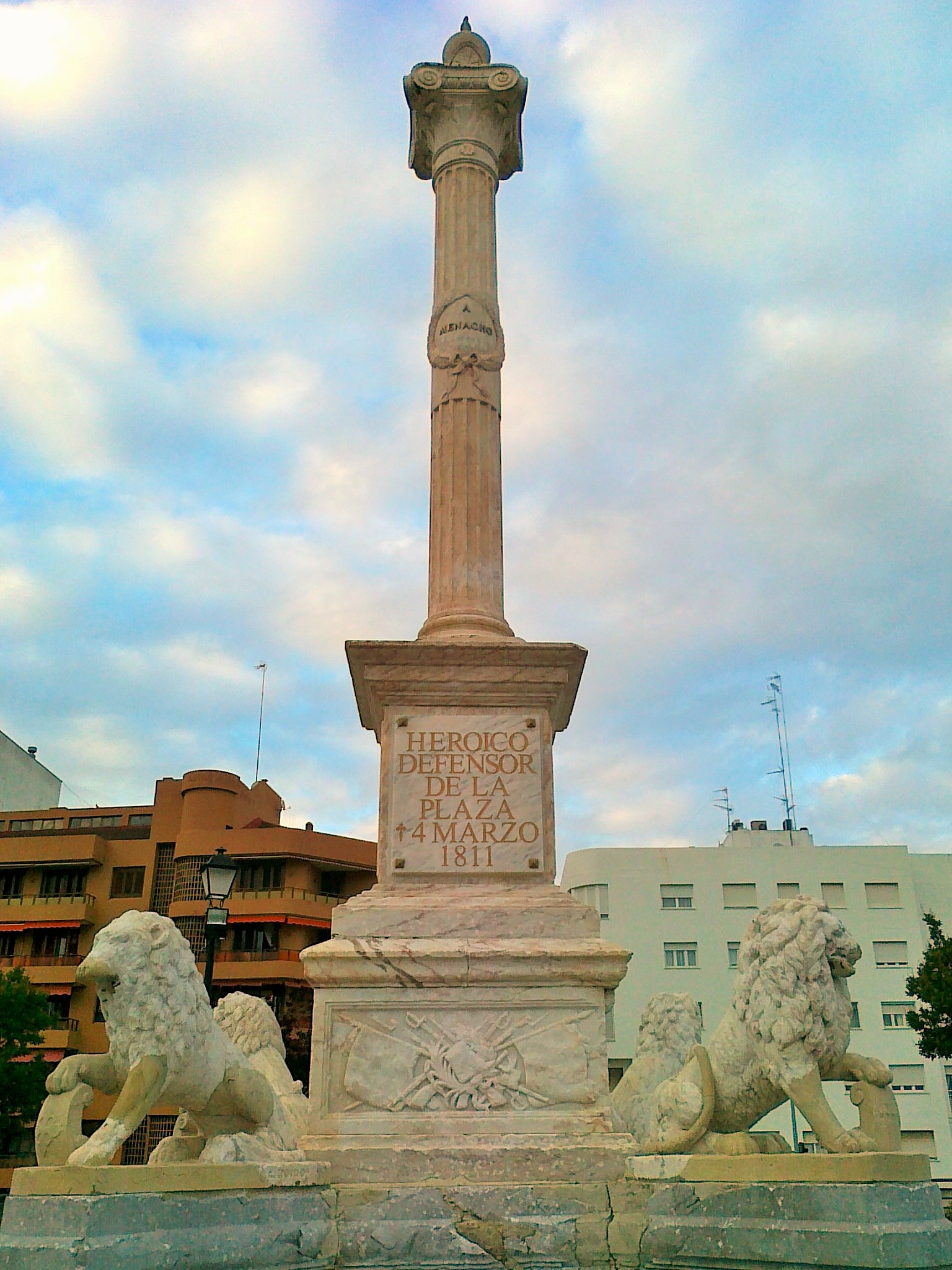 Monumento en honor del General Menacho-1